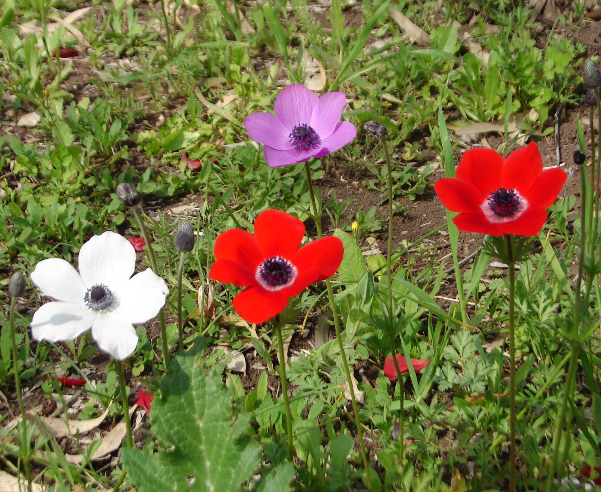 Anemones near Megiddo, Israel